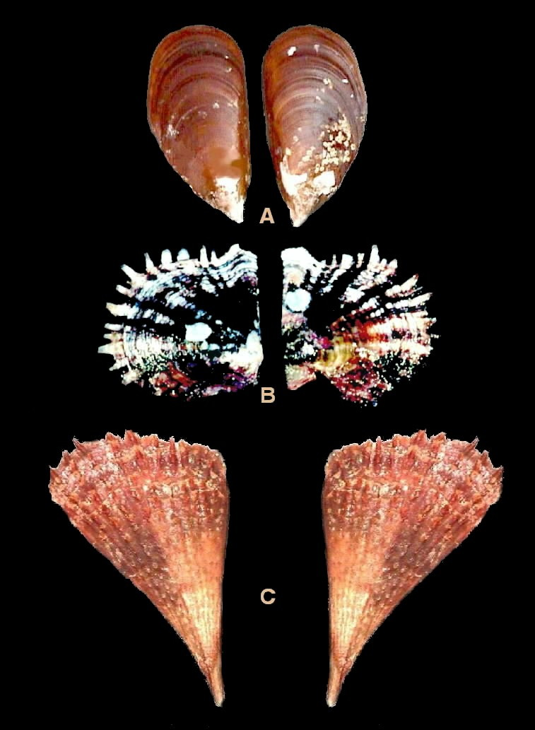 Fotos de Moluscos del estado Falcón - Venezuela A. Perna perna B. Pinctada imbricada C. Pinna carnea